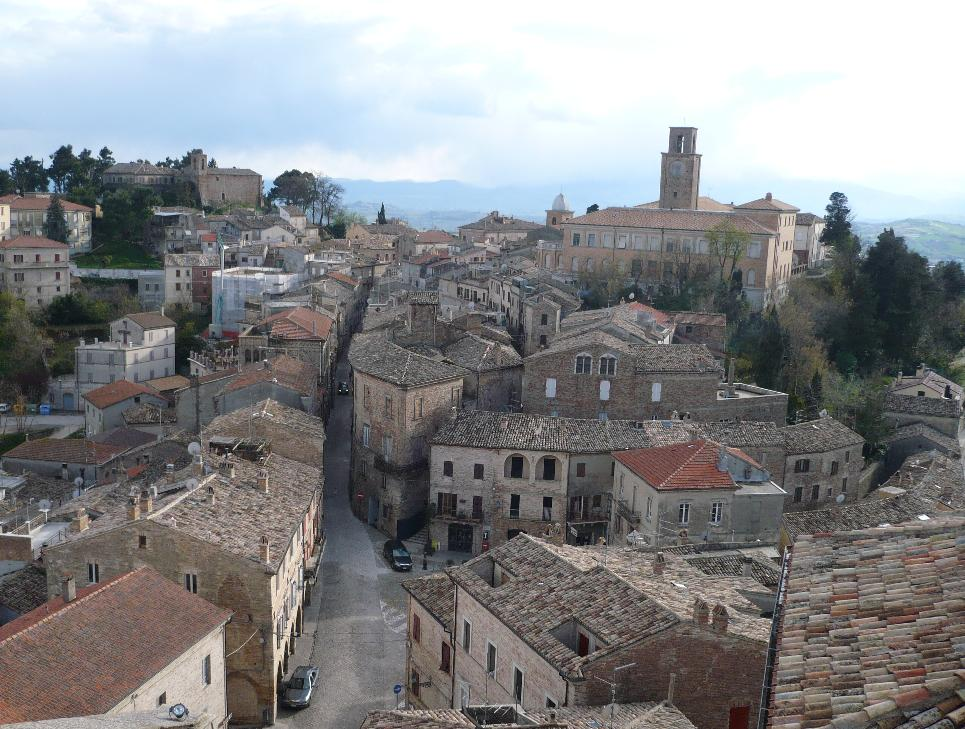 Panoramica sul paese di Ripatransone (AP) offerta dal campanile della cattedrale.